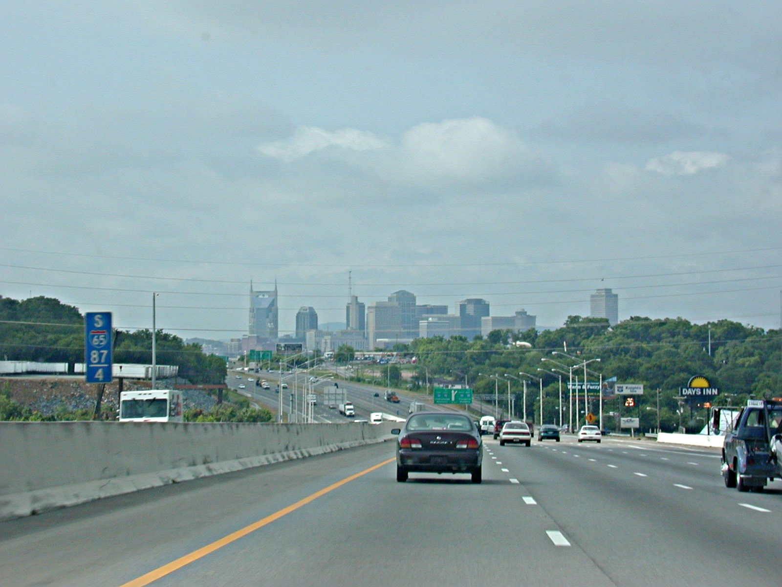 Nashville, Tennesee Skyline seen from I-65